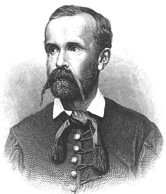 Sztregovai és kiskelecsényi Madách Imre (Alsósztregova, 1823. január 20. – Alsósztregova, 1864. október 5.) magyar költő, író, ügyvéd, politikus, a Kisfaludy Társaság rendes és a Magyar Tudományos Akadémia levelező tagja.